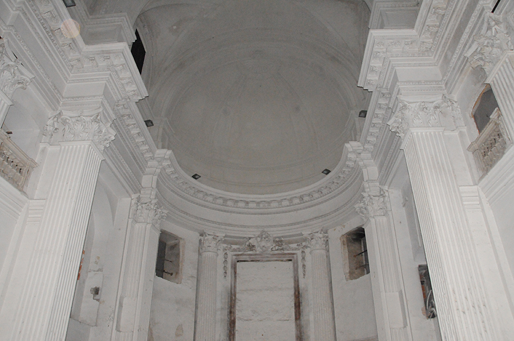 La tribuna